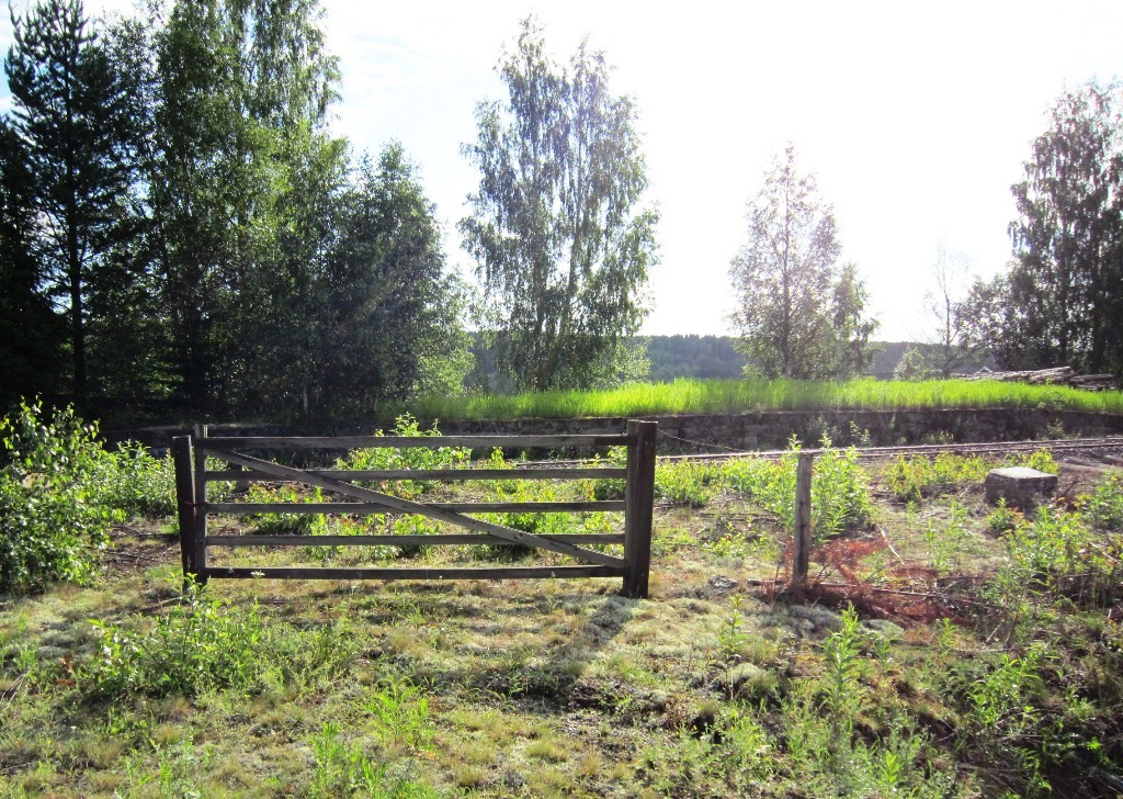 Vesterhaug stasjon på Solørbanen anno 2011